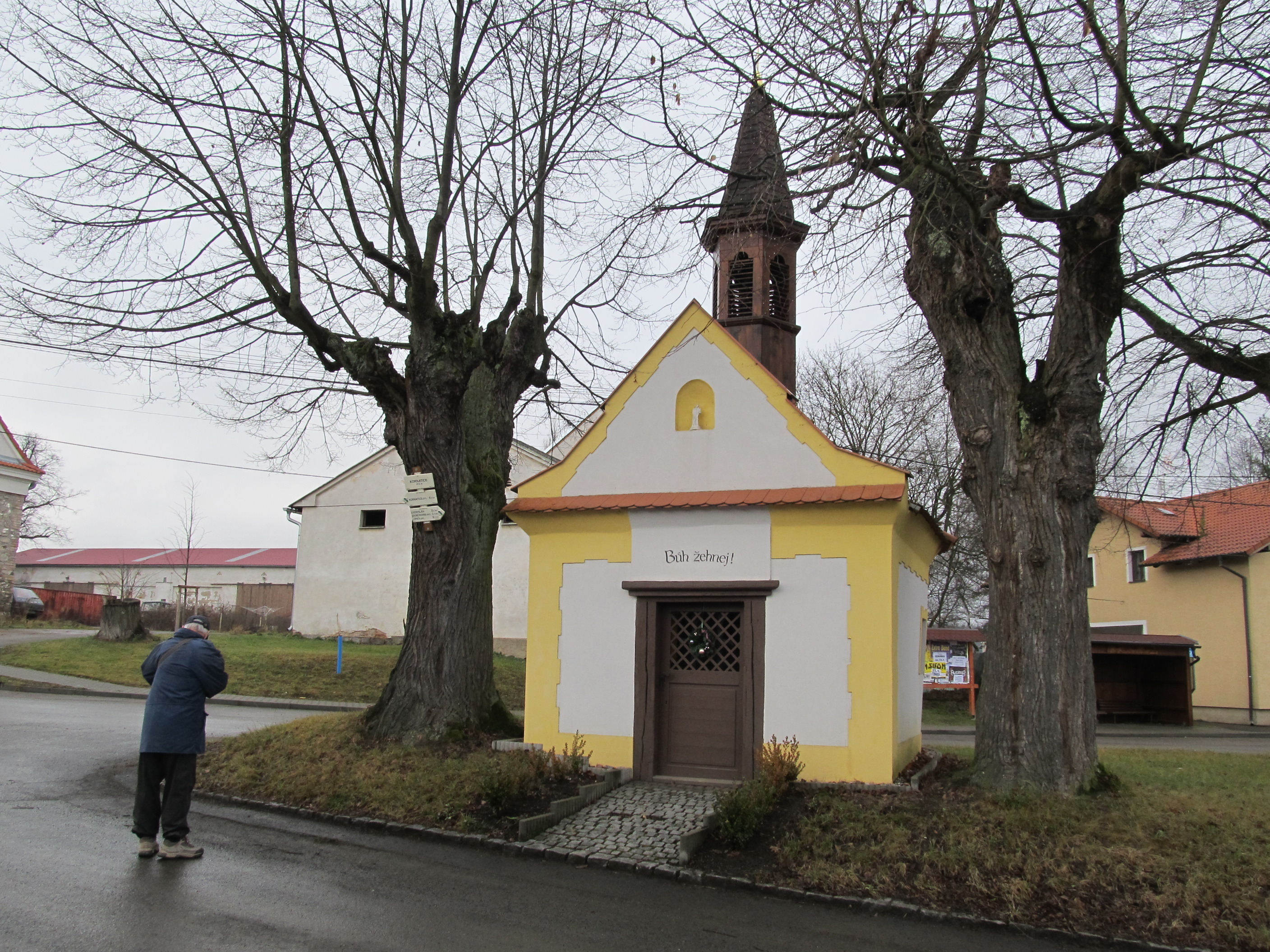 Kornatice - kaplička